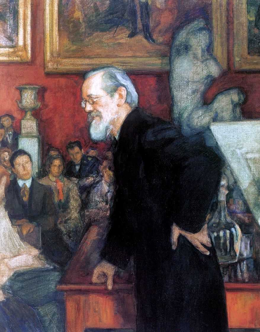 Портрет историка В.О.Ключевского. 1909